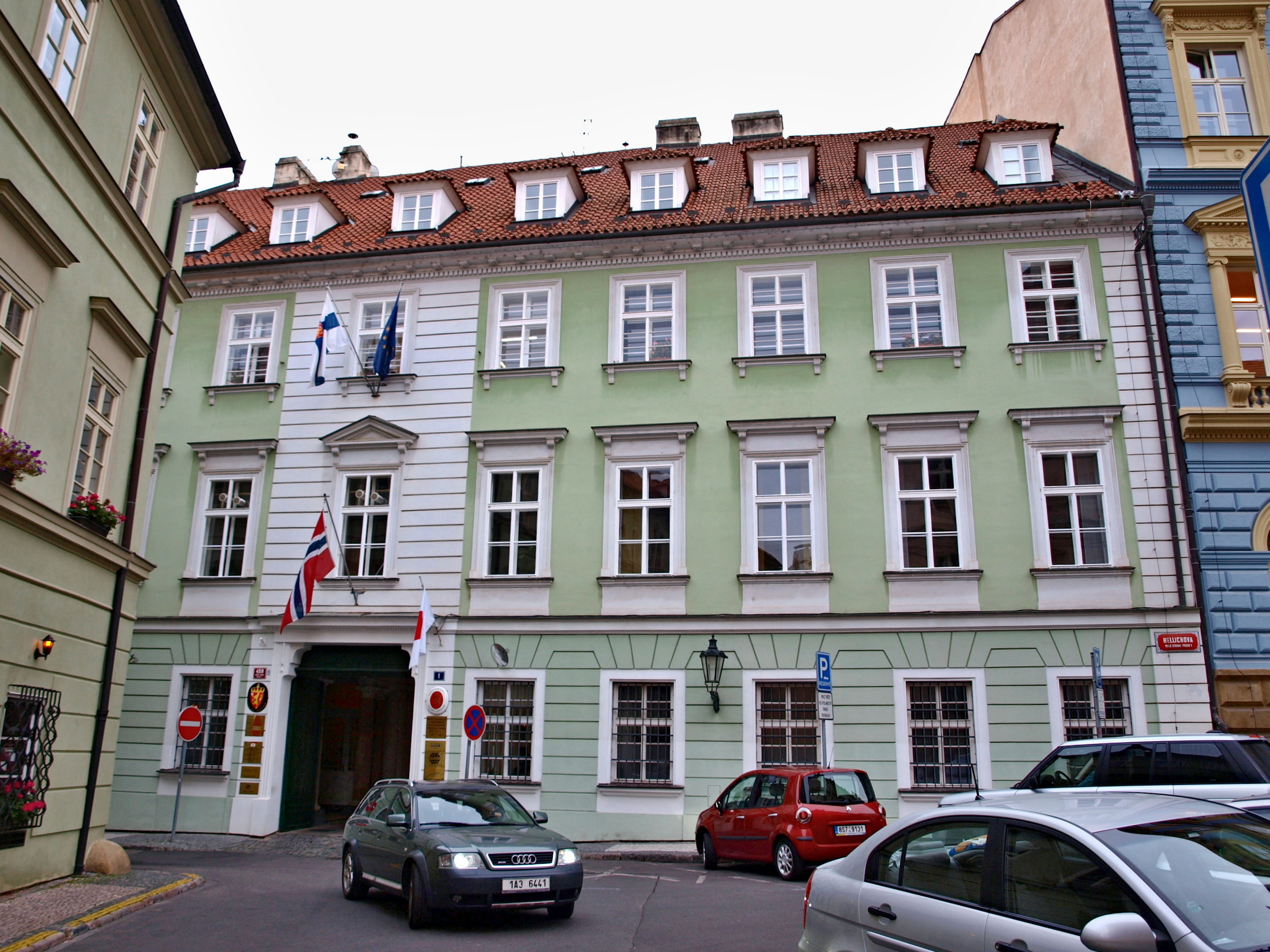 Chotkův palác, Hellichova